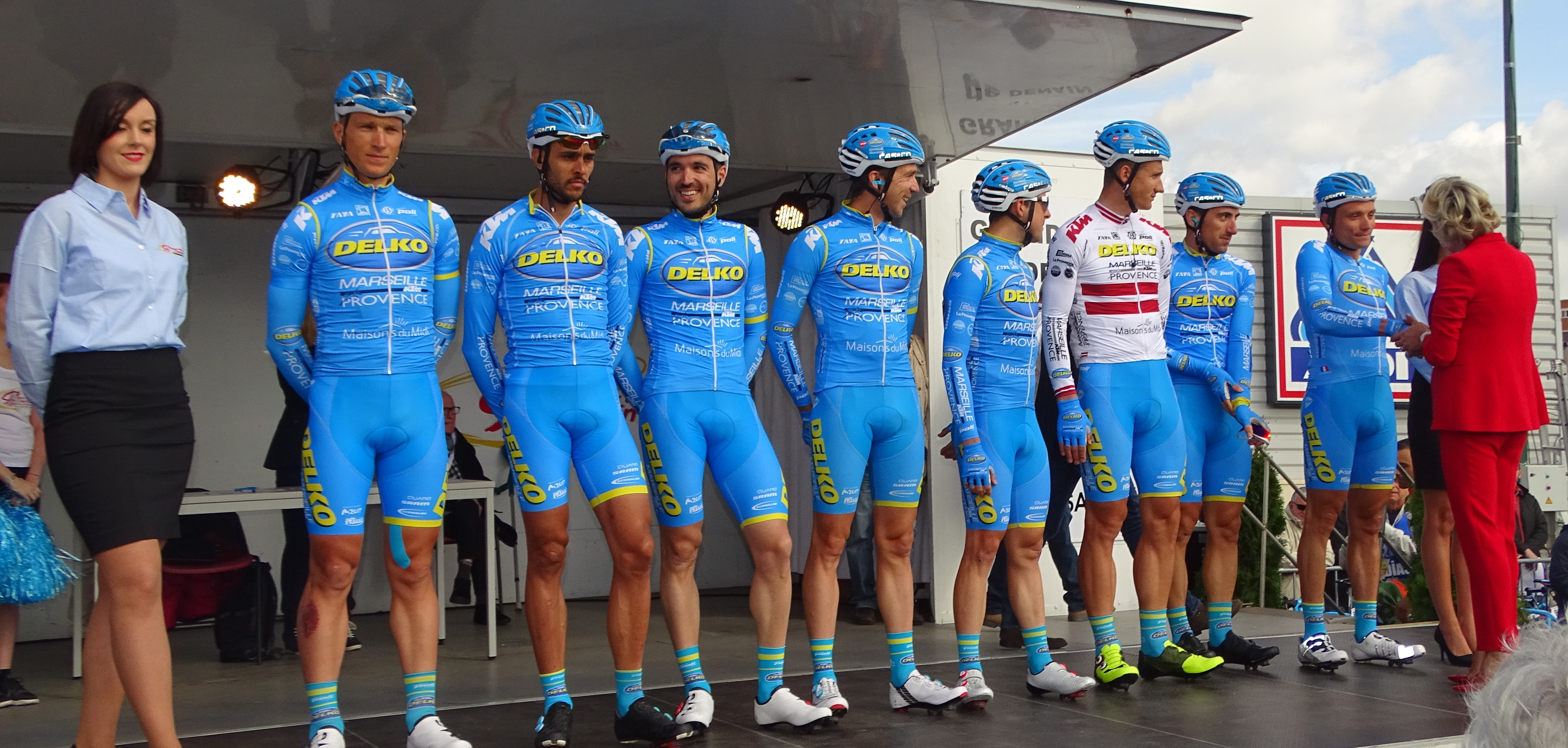 Reportage réalisé le jeudi 13 avril à l'occasion du départ et de l'arrivée du Grand Prix de Denain 2017 à Denain, Nord, Nord-Pas-de-Calais-Picardie, France.